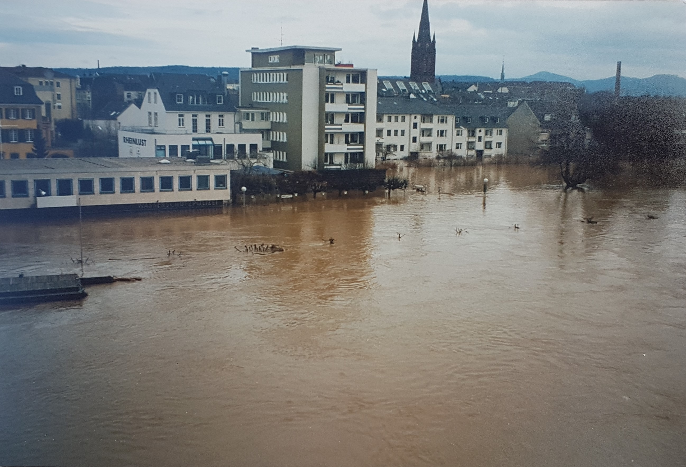 Sicht von der Kennedybrücke auf das Beueler Ufer beim Rheinhochwasser im Dezember 1993.